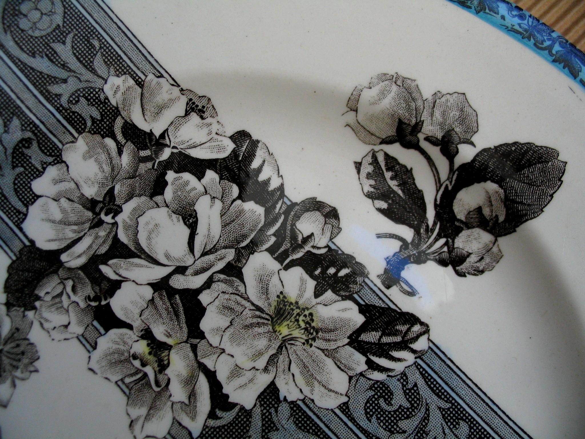 Assiette en faïence imprimée de Choisy-le-Roi, fin XIXe siècle, détail du décor, France